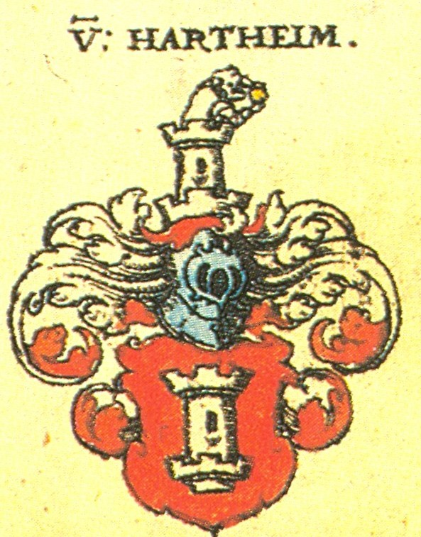 Ritterschaft und Adel in Franken von Hartheim